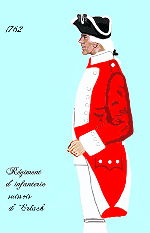 Uniform eines königlich französischen Infanterie-Regiments nach dem Choisel-Erlaß von 1762. - Entnommen und überarbeitet aus: „LES UNIFORMES ET LES DRAPEAUX DE L'ARMÉE DU ROI“ Marseille 1899.